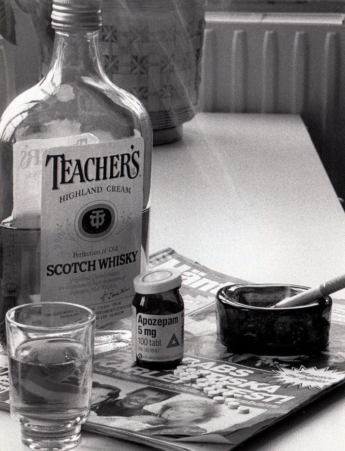 Droger